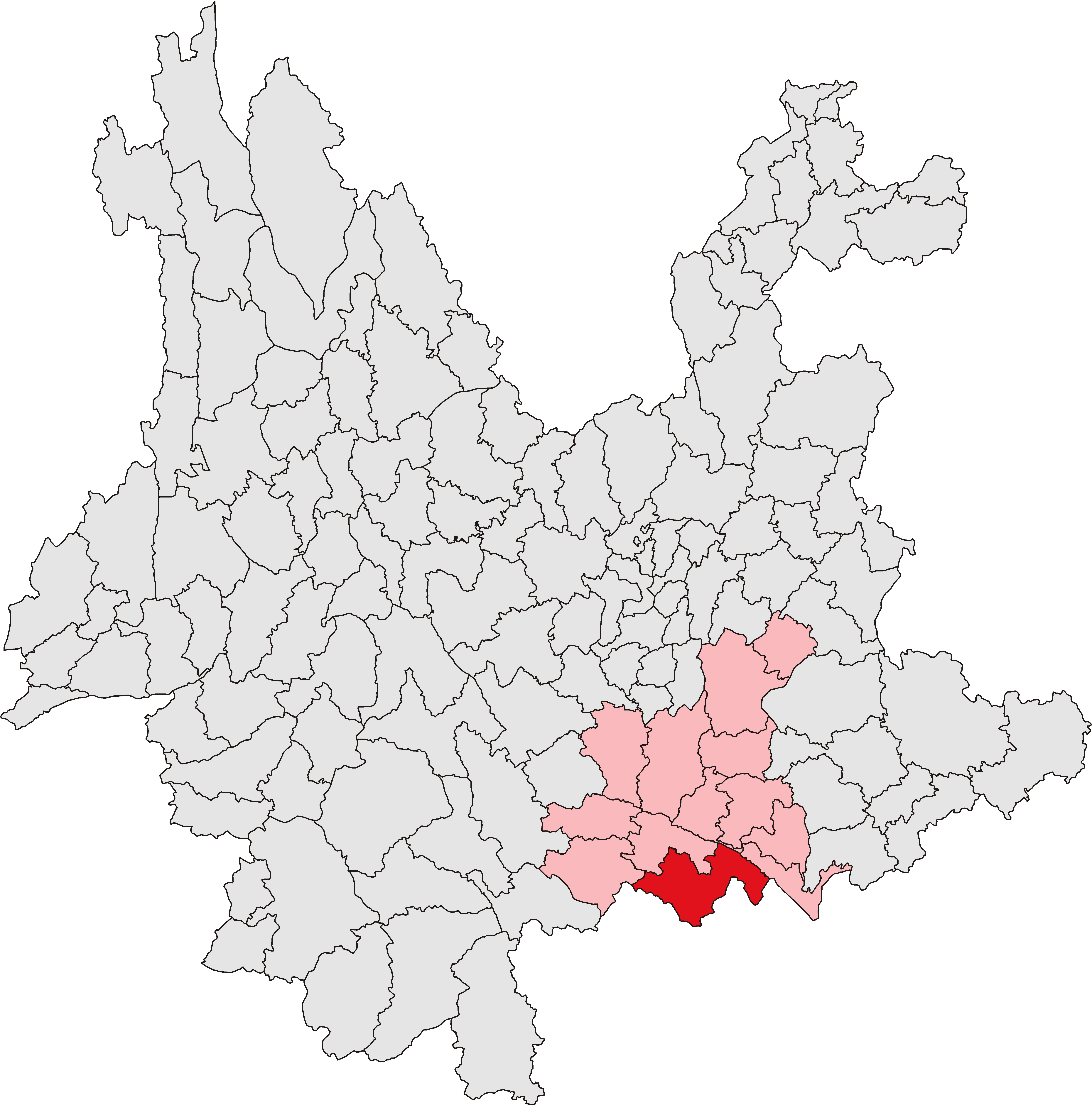 金平苗族瑶族傣族自治县位置图